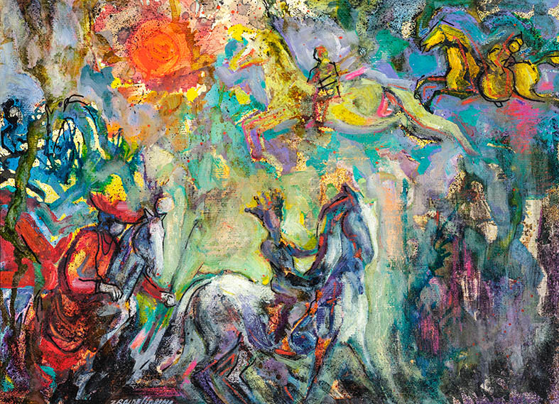 Walter Baldessarini Apocalisse 47x64cm 1995